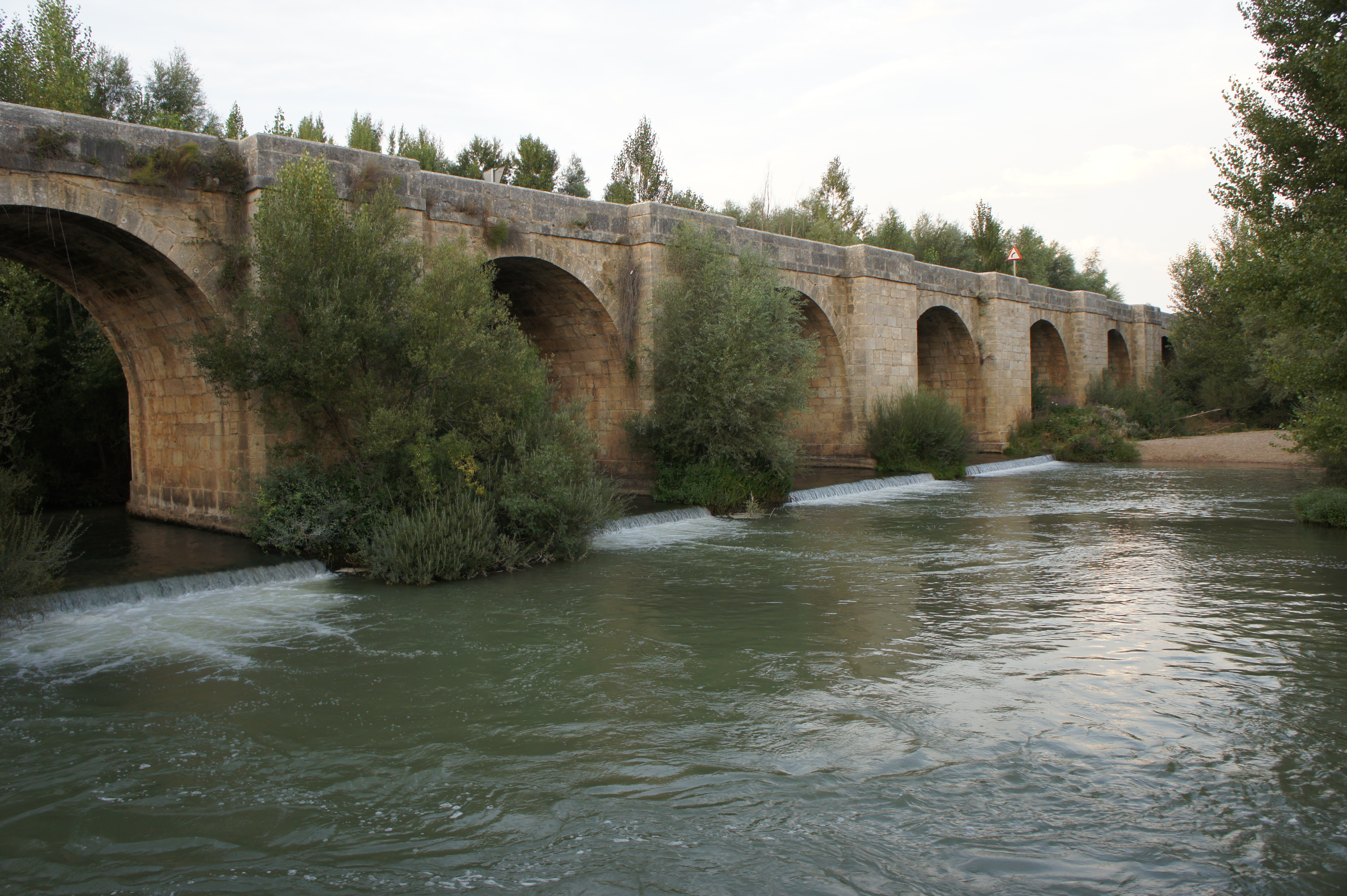 Puente sobre el río Pisuerga.